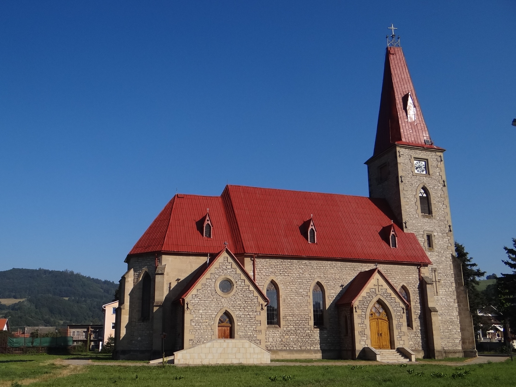 Sedliacka Dubová